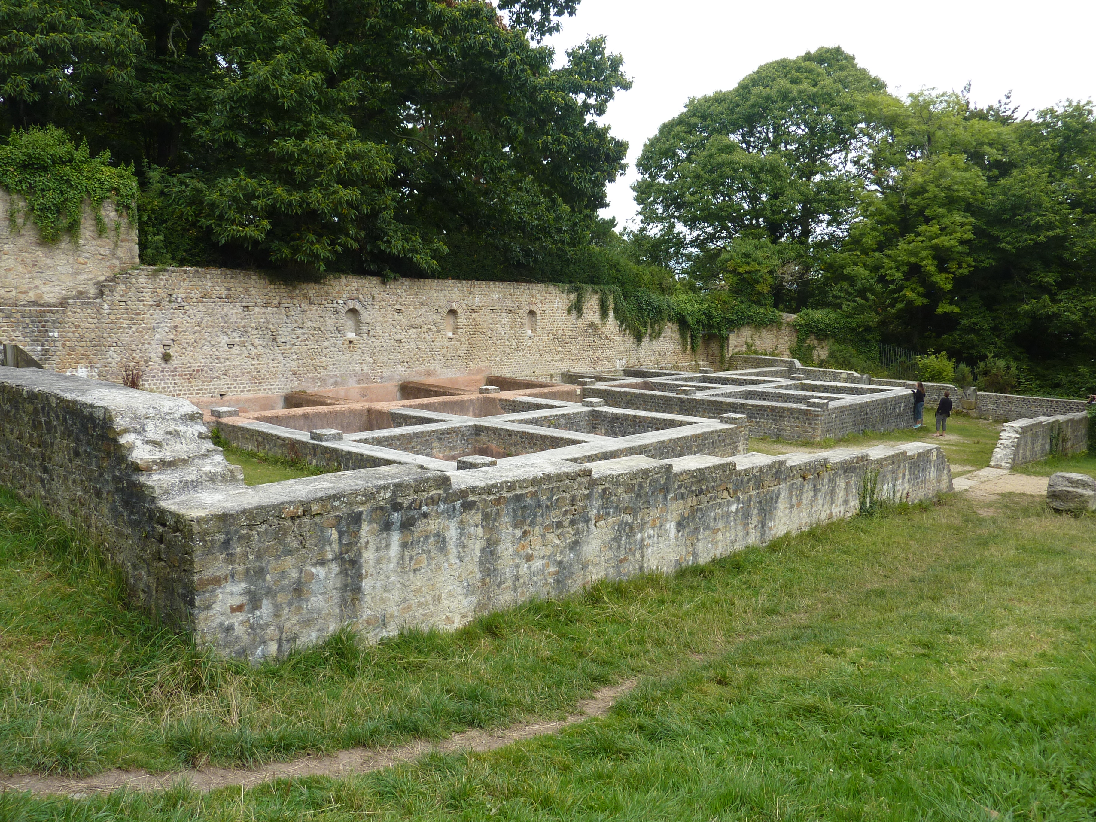 Douarnenez : les ruines (restaurées) de l'un des quatre bâtiments des salaisons des Plomarc'h ( époque gallo-romaine; servait à la fabrication du garum)